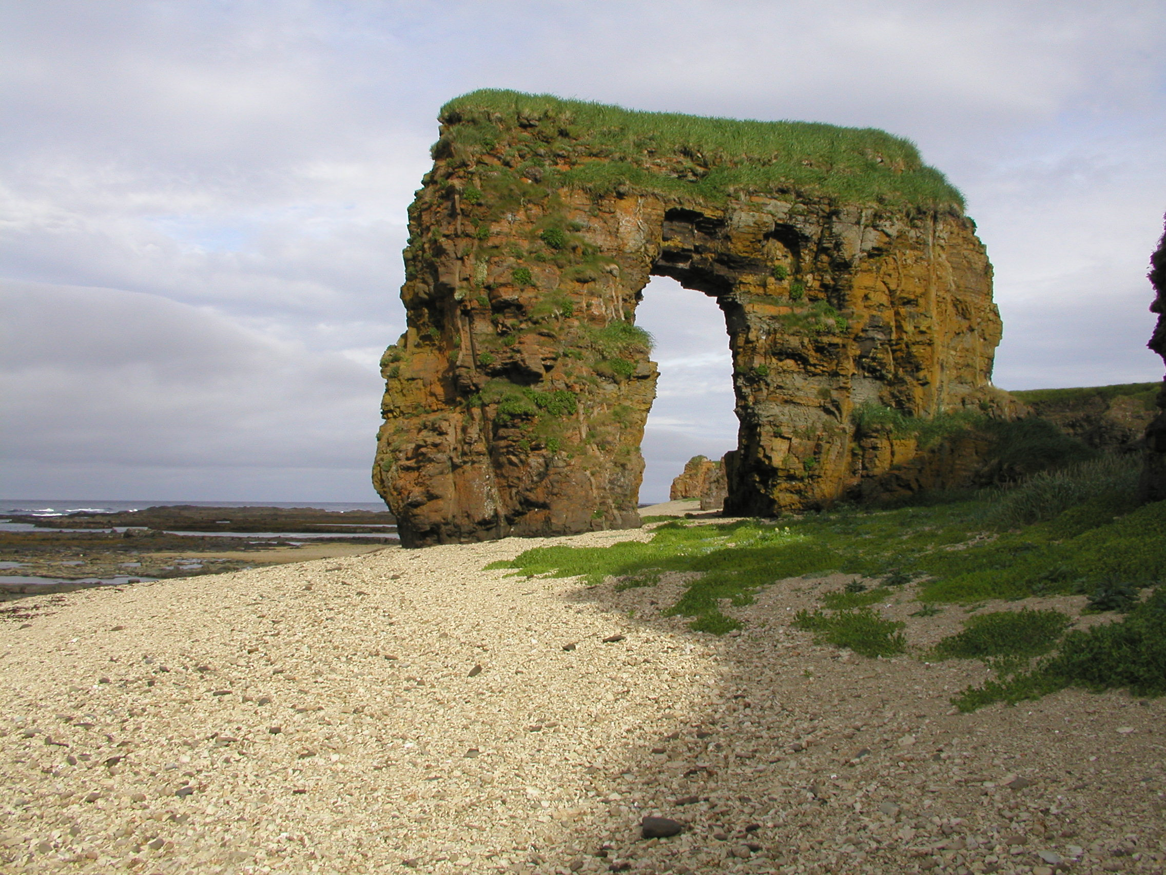 Арка Стеллера, Алеутский район This image is related to the protected area of Russia number 4110004